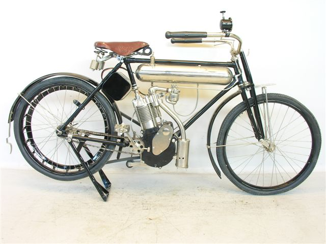 Marsh-Metz (MM) motorcycle 500 cc 1907